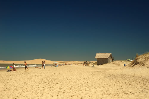 Playa del balneario Valizas, Uruguay (enero de 2006). Author: Fernando da Rosa